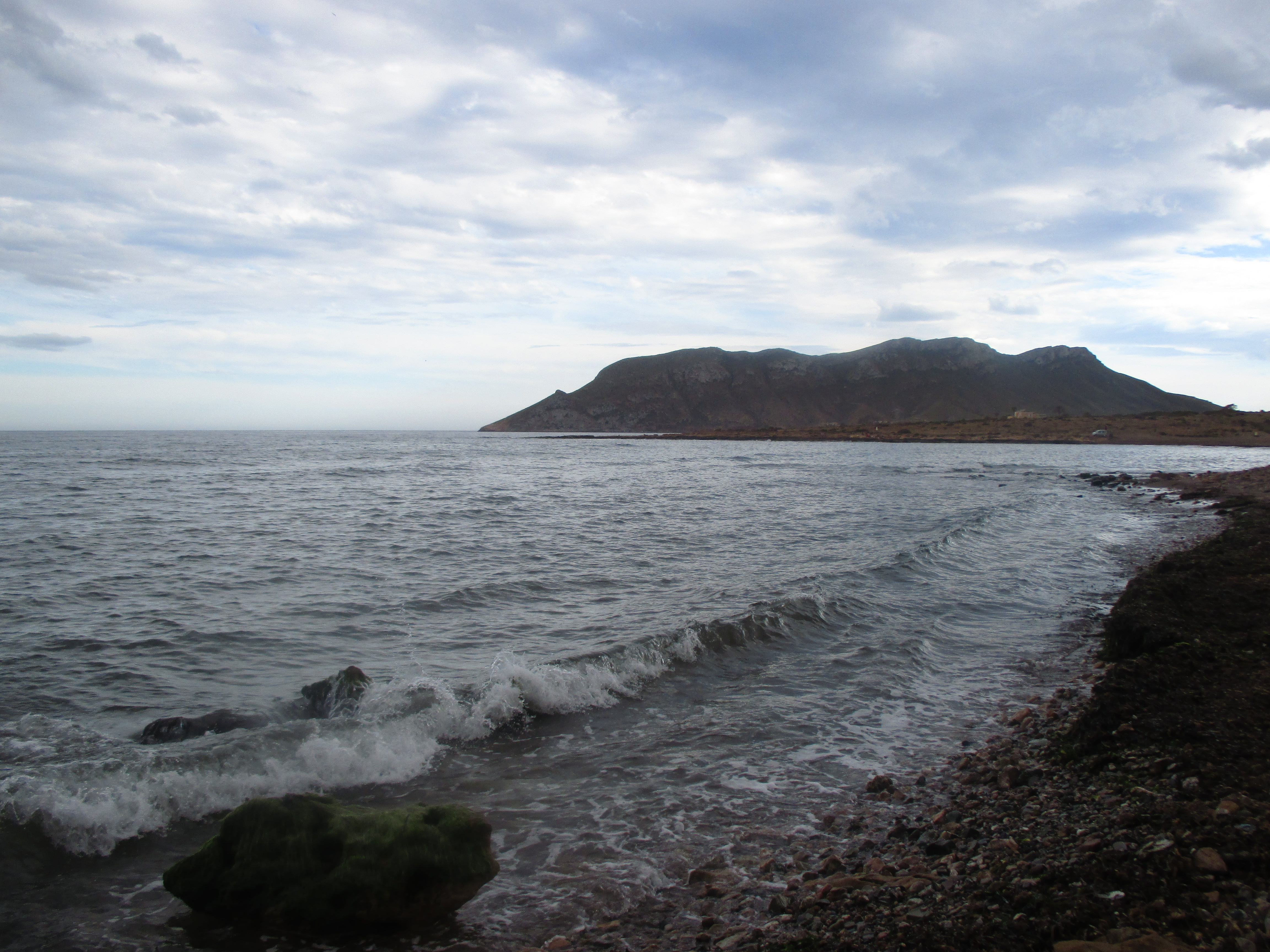 Playa del Charco, en segundo término, la Punta del Sombrerico y, al fondo, el Cabo Cope. This is a photography of a Special Area of Conservation in Spain with the ID: ES6200031. Natura2000 entry, EEA entry